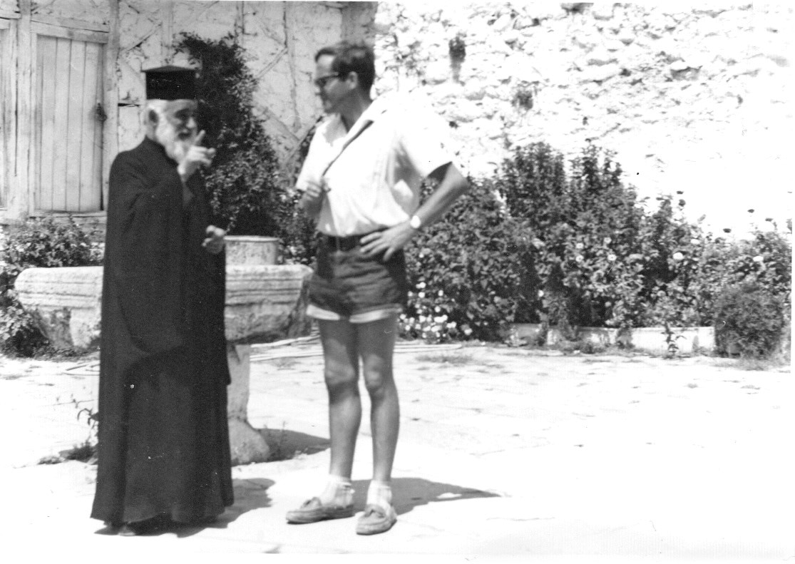 Porträt R. Beile, Pfarrer und Jugendführer in Jestetten (Klettgau). Hellas-Fahrt der Evang. Jugend Grenzland, R. Beile im Gespräch mit orthodoxem Priester, Meteora 1968.